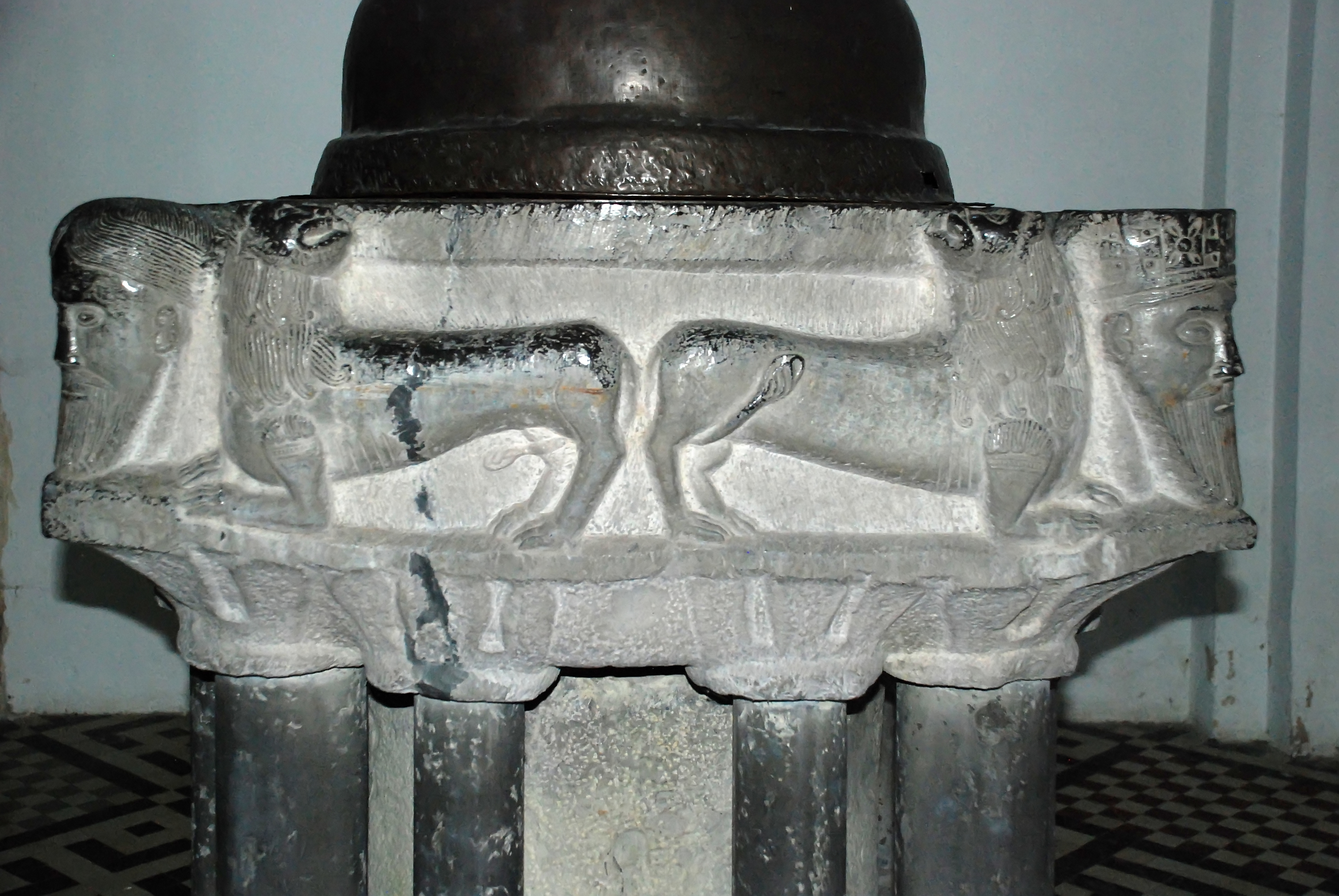 Belgique - Wallonie - Fonts baptismaux de Saint-Séverin-en-Condroz